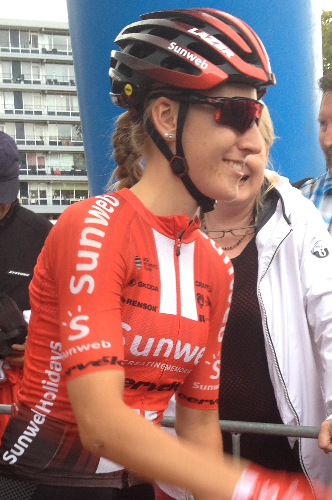 Criterium RaboRonde in Heerlen op vrijdag 2 augustus 2019